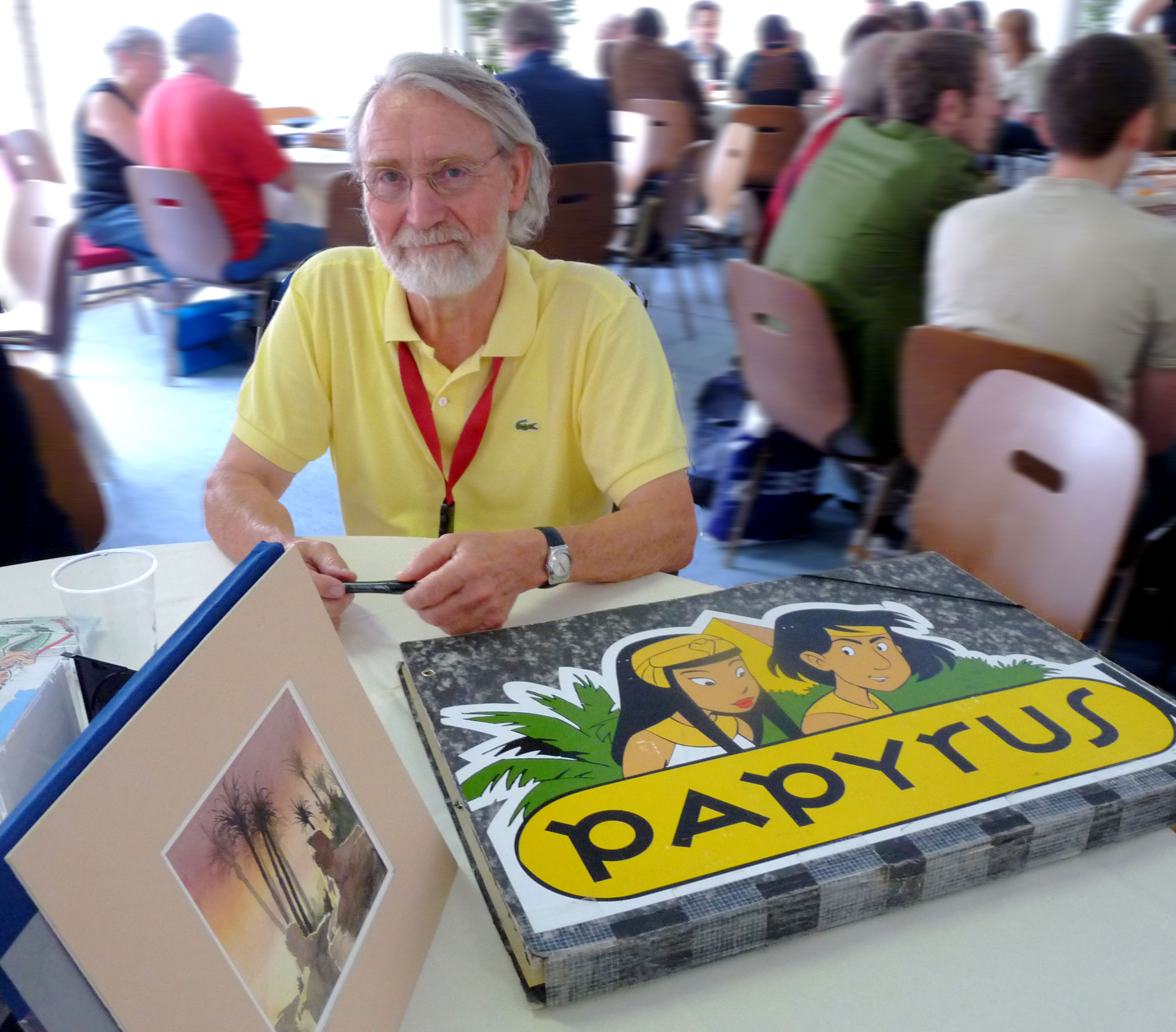 Lucien De Gieter au Festival européen de la bande dessinée Strasbulles 2009